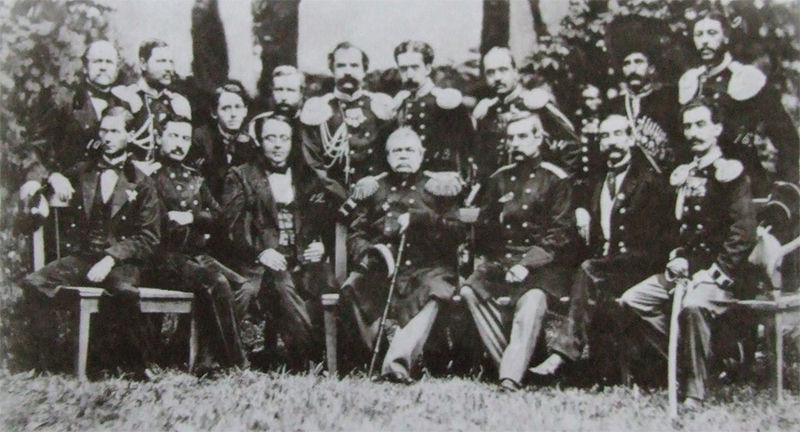 Mikołaj Murawiow (po środku)